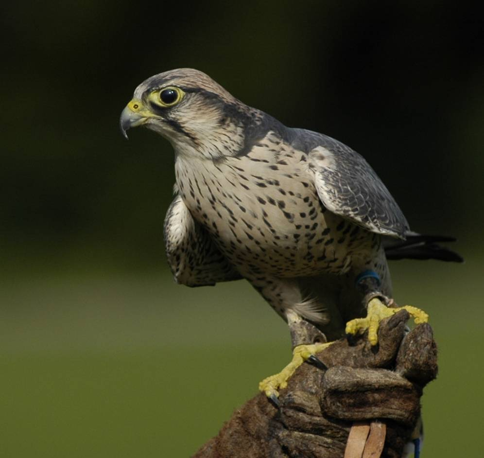 Falke bei einer Falknereivorführung, British Day 2005, Hamburg